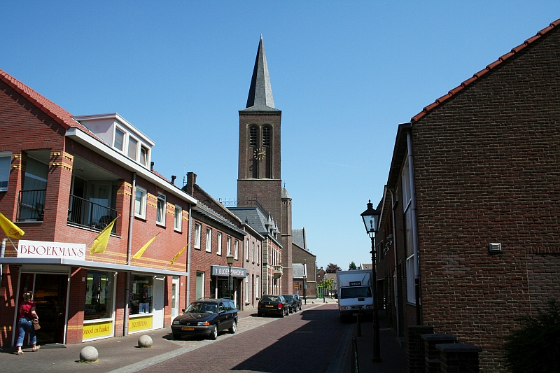 Dorpstraat in Maasbree (Limburg, The Netherlands)